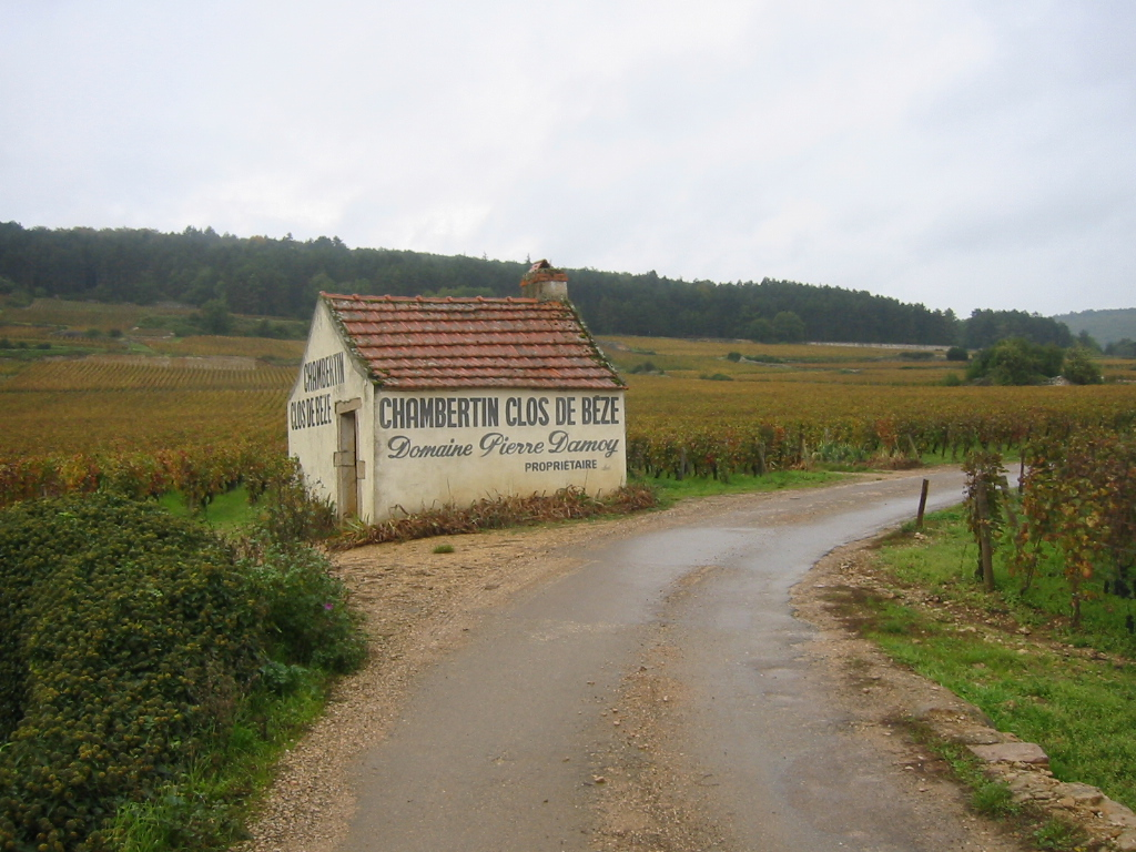 Vignoble du Clos de Beze. Appelation Gevrey Chambertin grand cru AOC des vins de Bourgogne